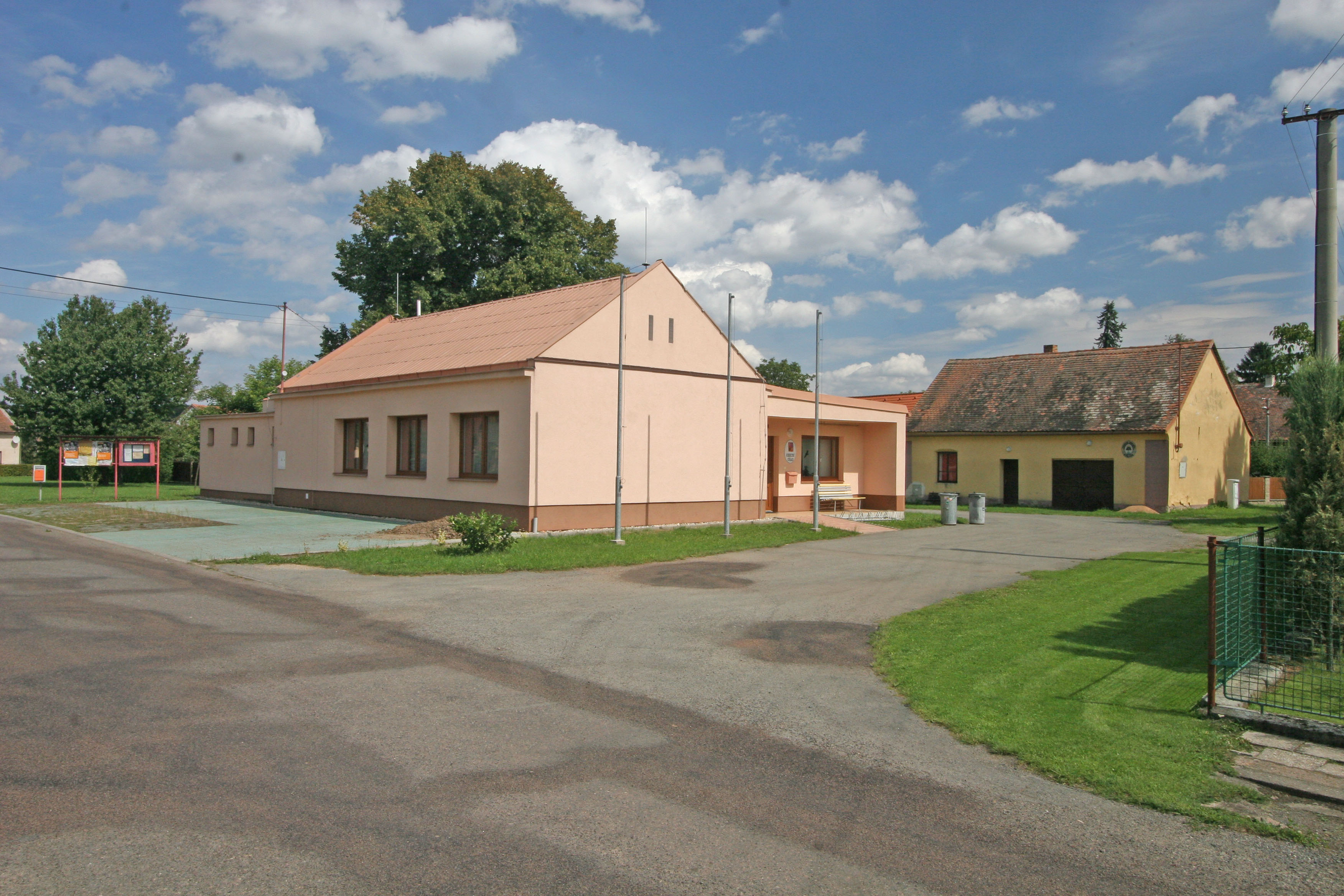 Stojice obecní úřad